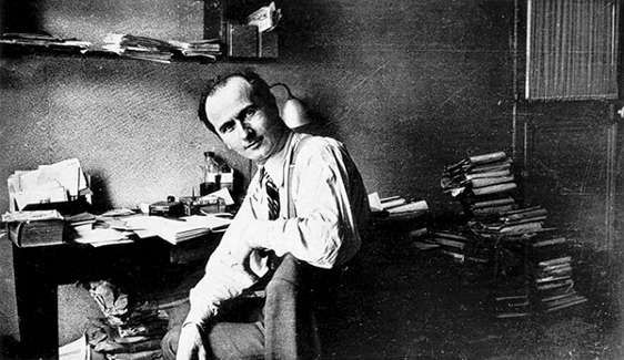 Camillo Berneri, né le 20 mai 1897 en Italie à Lodi et mort dans la nuit du 5 au 6 mai 1937 à Barcelone en Espagne probablement assassiné par des agents du Guépéou est un philosophe, écrivain et militant communiste libertaire italien.